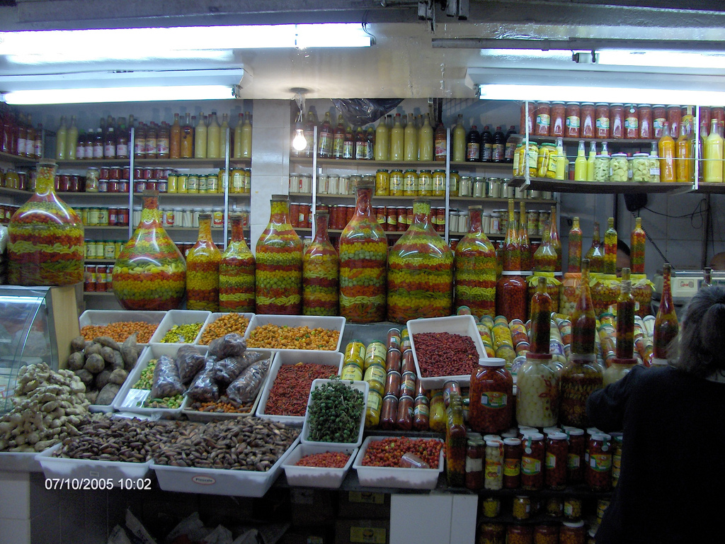 Uma banca de especiarias do Mercado Centralde Belo Horizonte, Minas Gerais, Brasil